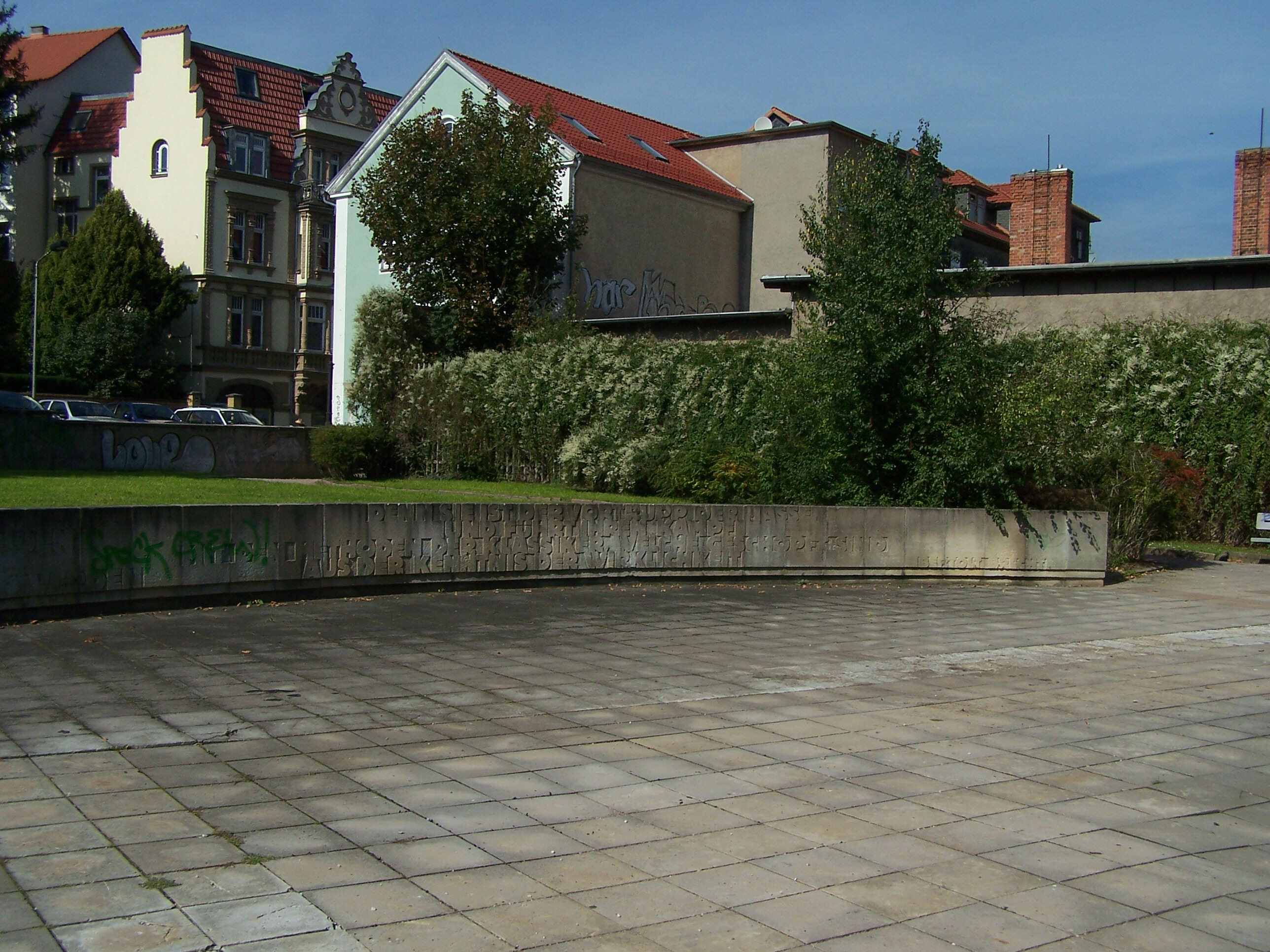 Teilansicht (nördlicher Teil) zur Platzumrandung mit einem dreiteiligen Spruchband (Zitat von Bertolt Brecht).